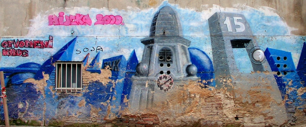 grafiti u Rijeci (šporki Stari grad)